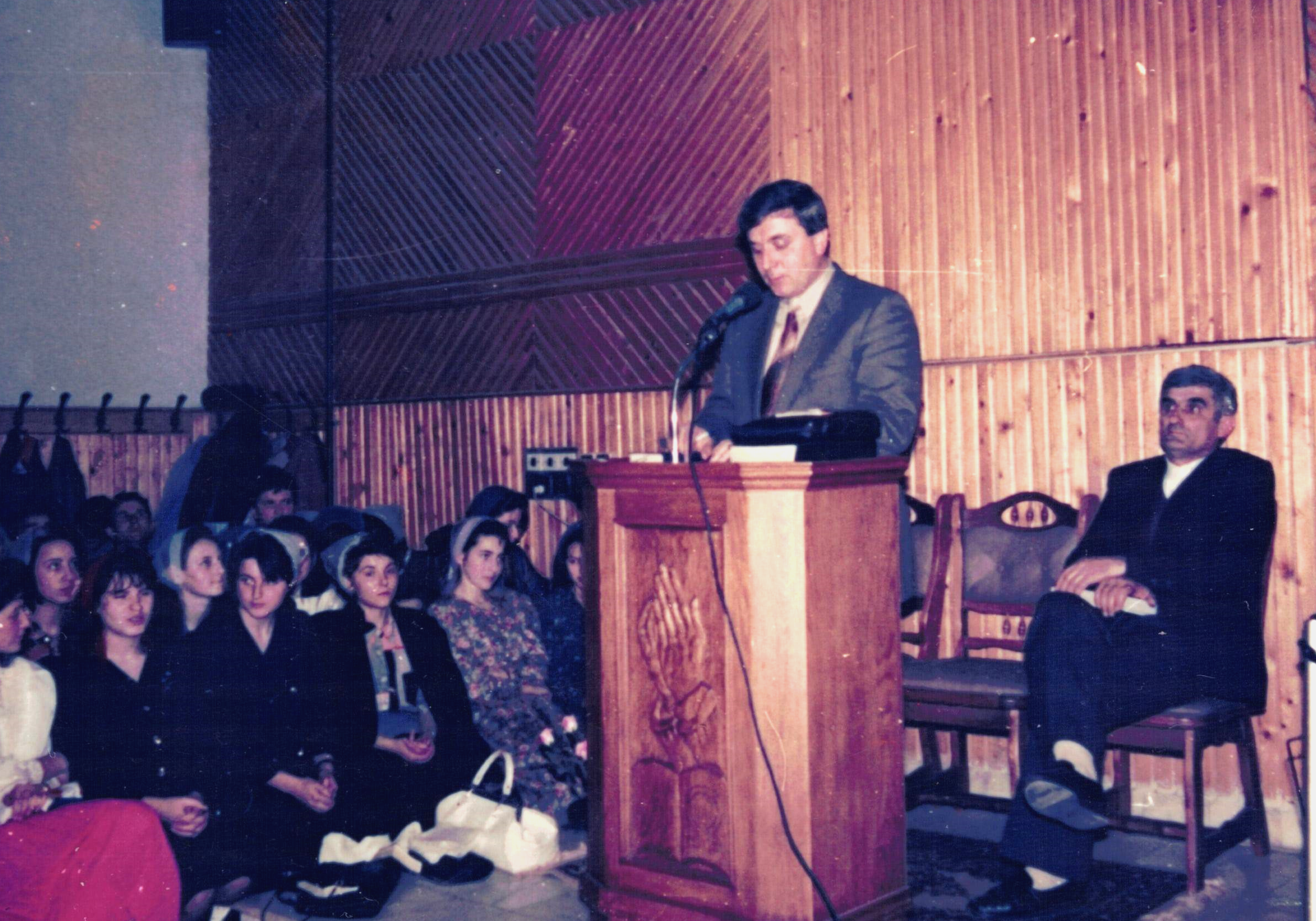 Victor Opriș predică pe str. Crasna, Satu Mare